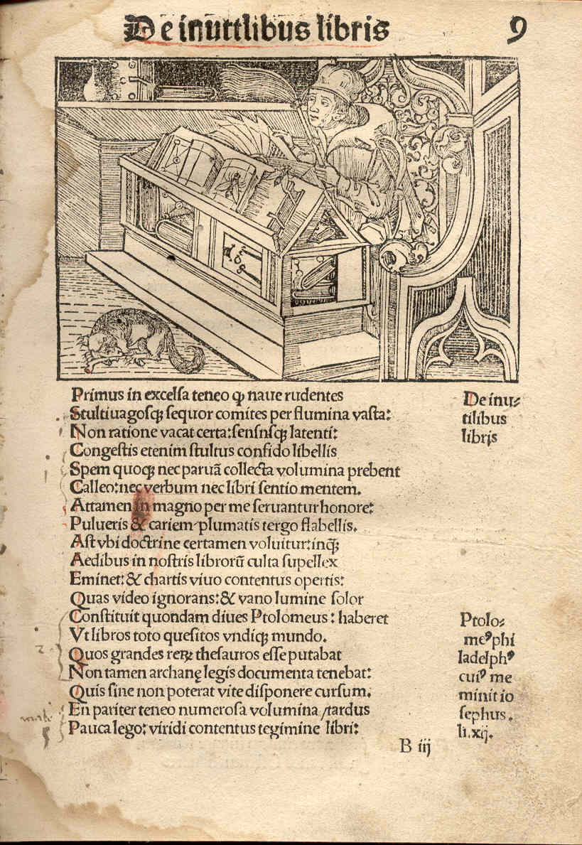 Büchernarr In: Stultifera navis, 1497 Lateinische Übersetzung von Sebastian Brants Narrenschiff (Basel, 1494)